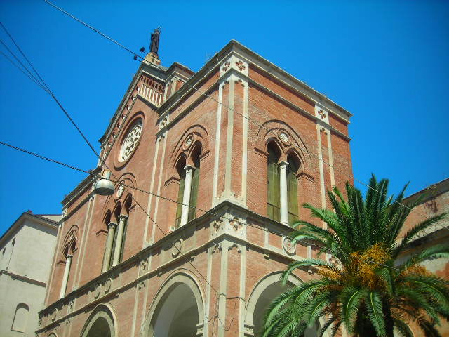 Scorcio della facciata neogotica della Cattedrale di Gaeta in una fotografia del 2007.